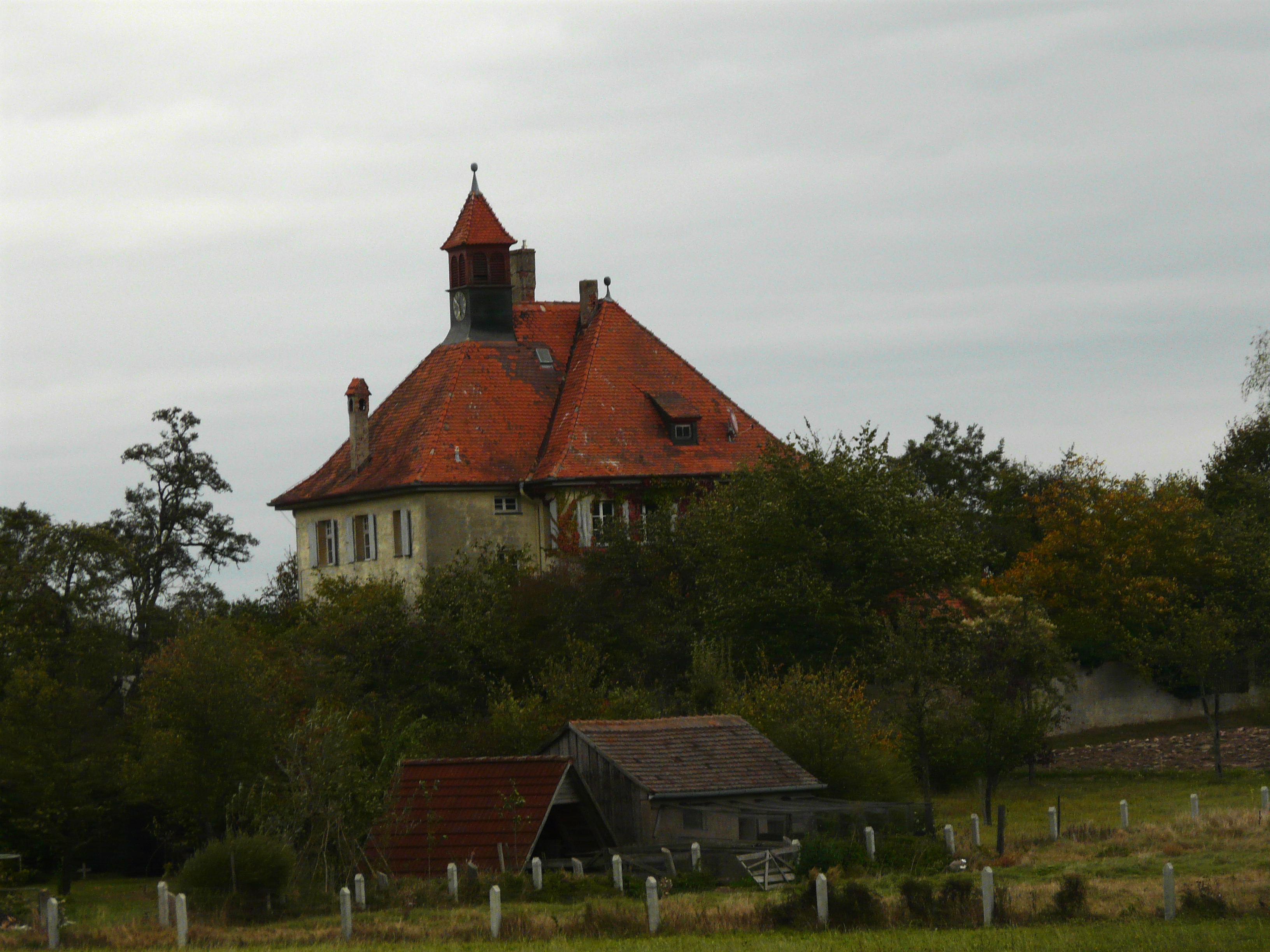 Peppenhoechstaedt - Ehemaliges_Schulhaus